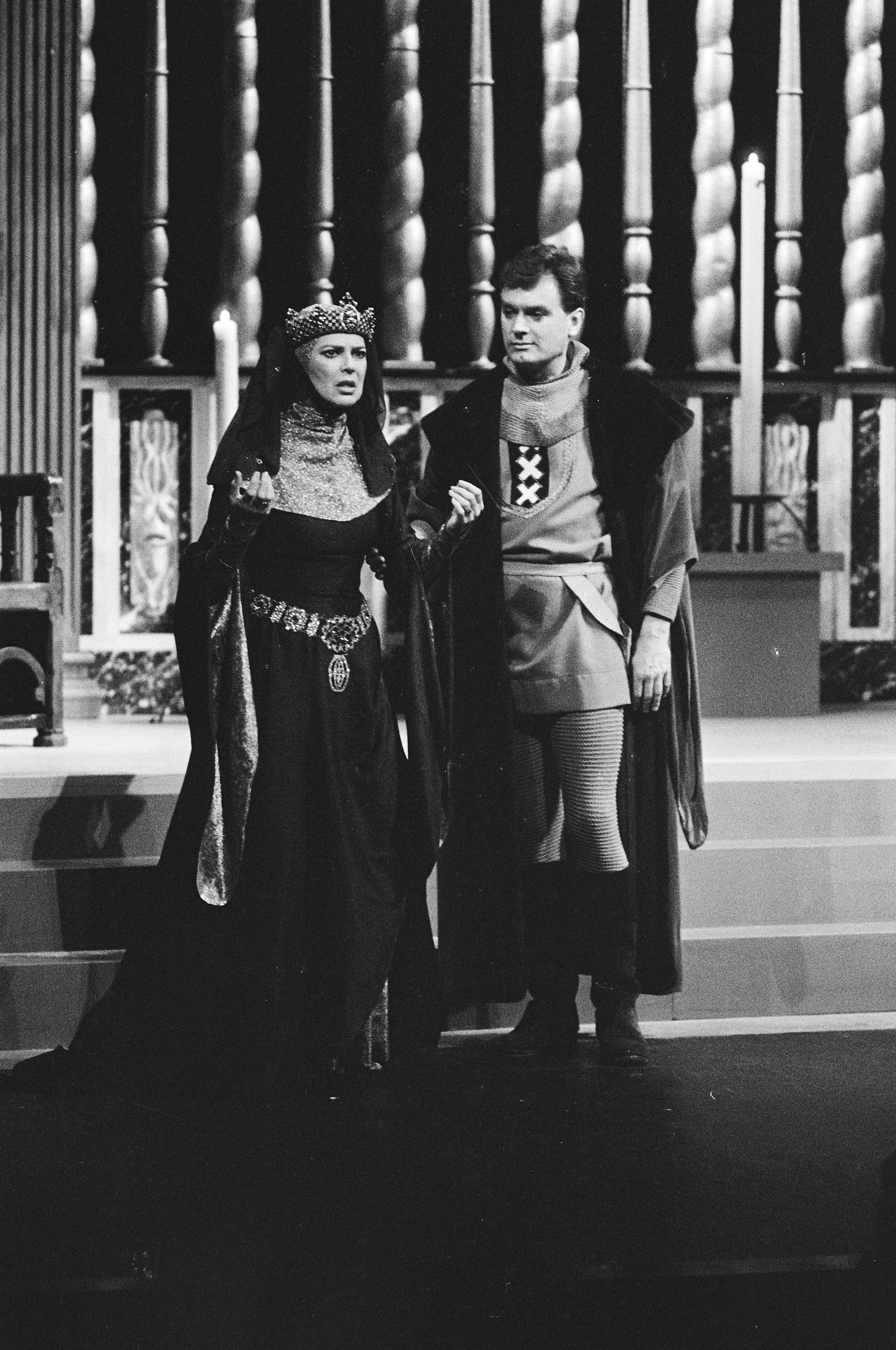 Collectie / Archief : Fotocollectie Anefo Reportage / Serie : Toneelvoorstelling "Gijsbreght van Aemstel" onder regie van Carel Briels in de Stadsschouwburg in Haarlem Beschrijving : Sigrid Koetse als Badeloch, Carol van Herwijnen als Gijsbreght Datum : 31 december 1982 Locatie : Haarlem, Noord-Holland Trefwoorden : acteurs, theaters, toneel Persoonsnaam : Briels, Carel Fotograaf : Bogaerts, Rob / Anefo Auteursrechthebbende : Nationaal Archief Materiaalsoort : Negatief (zwart/wit) Nummer archiefinventaris : bekijk toegang 2.24.01.05 Bestanddeelnummer : 932-4485